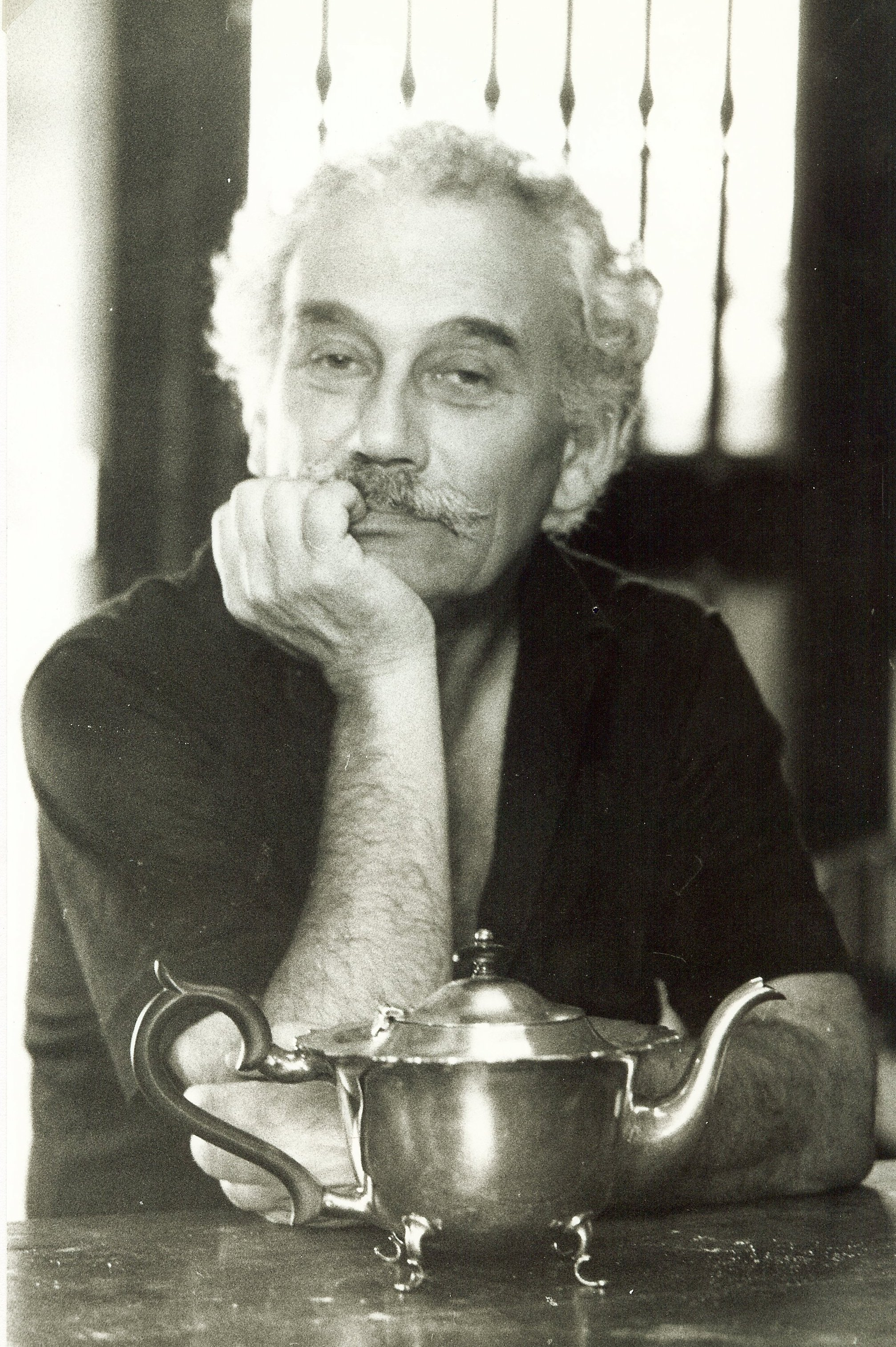 Théo TOBIASSE, 1984, St.Paul-de-Vence, France